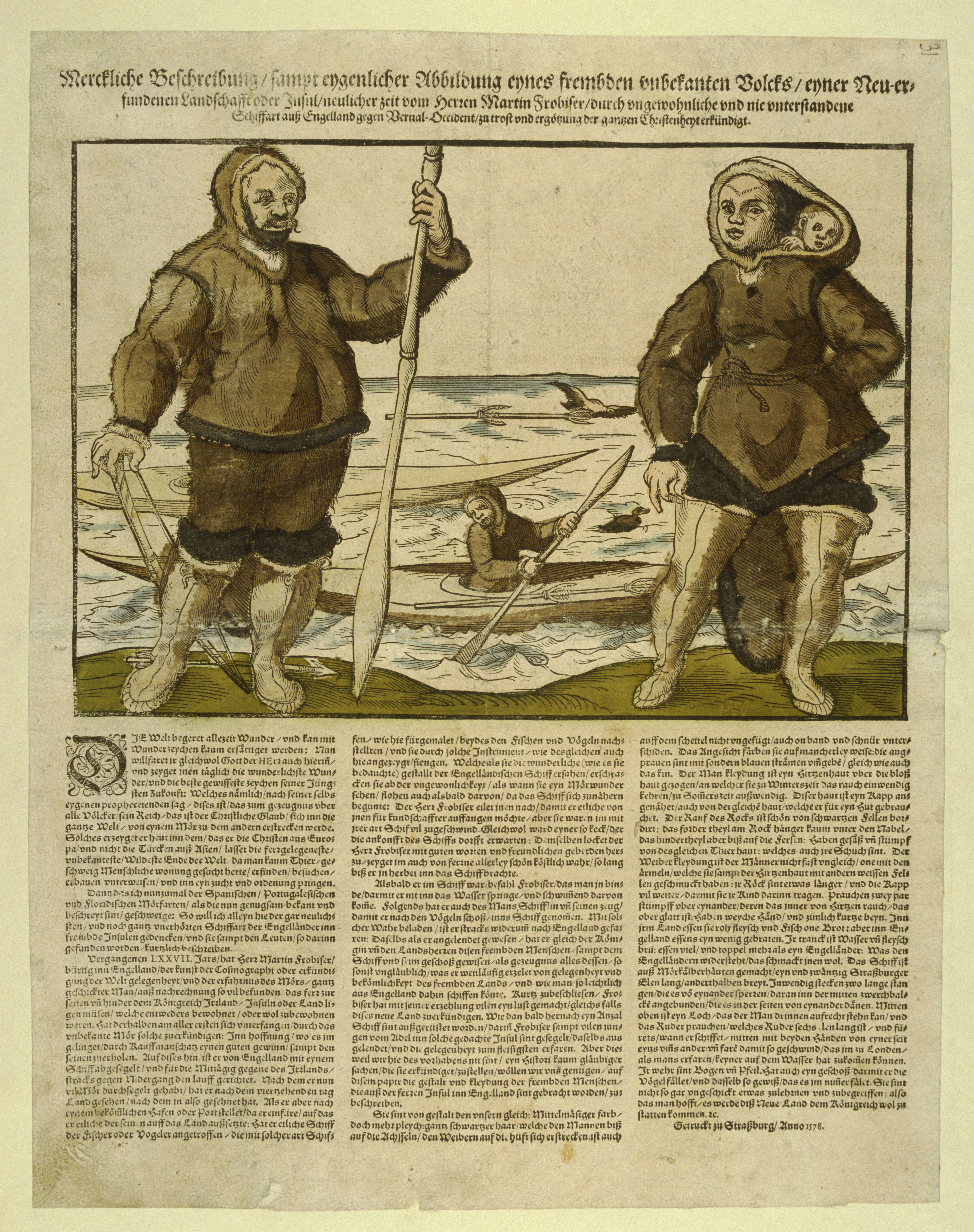 Merckliche Beschreibung sampt eygenlicher Abbildung eynes frembden unbekanten Volcks... Bericht über Martin Frobishers dritte Reise 1578